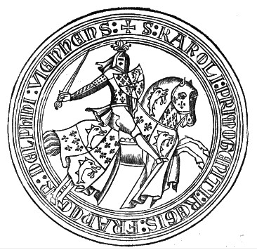 Pečeť prince Karla